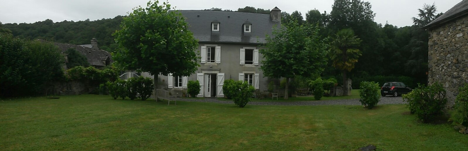 Maison Pruede Lezignan